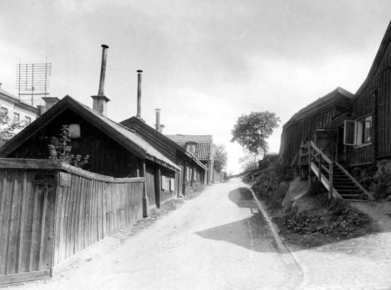 Lotsgatan från Sågargränd österut